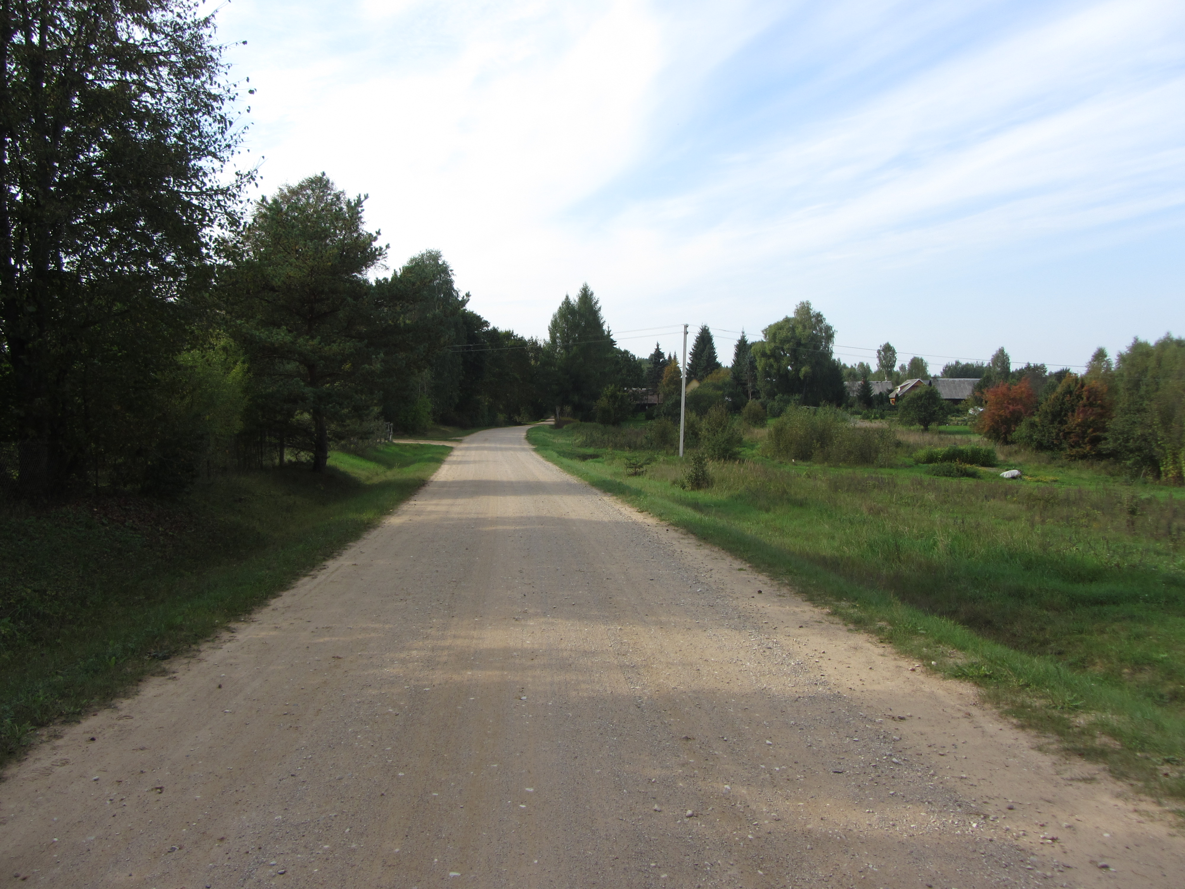 Šnieriškės 33207, Lithuania